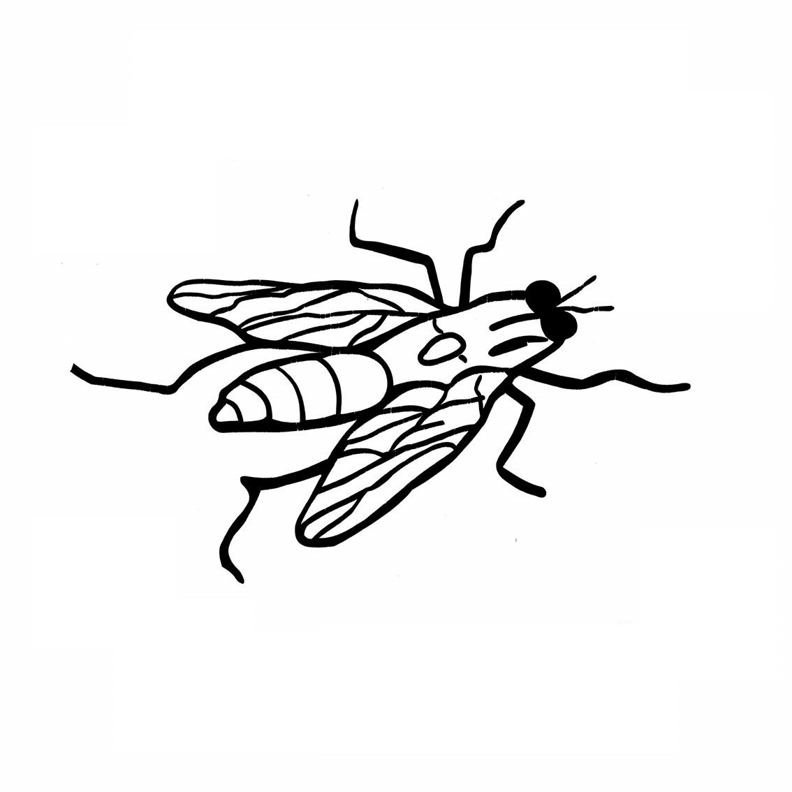 Das Symbol vom Neukirchener Stadtteil Seigertshausen: Eine Bremse.